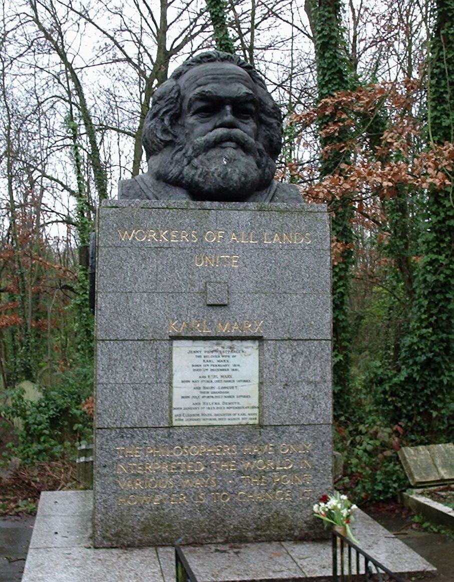 Karl Marx Tomb in London (Karl Marx Mezar Taşı - Londra)